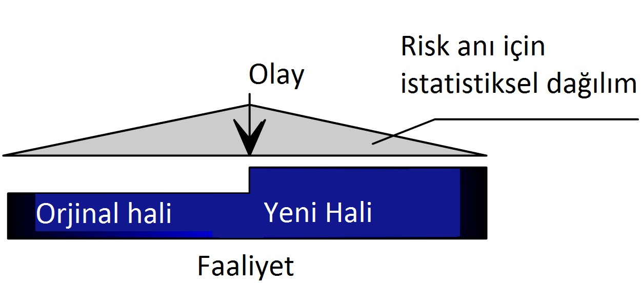 Olay Zinciri metodolojisi